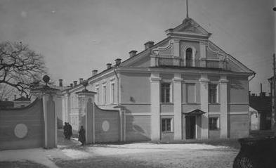 Будынак Магістрата ў Гродне